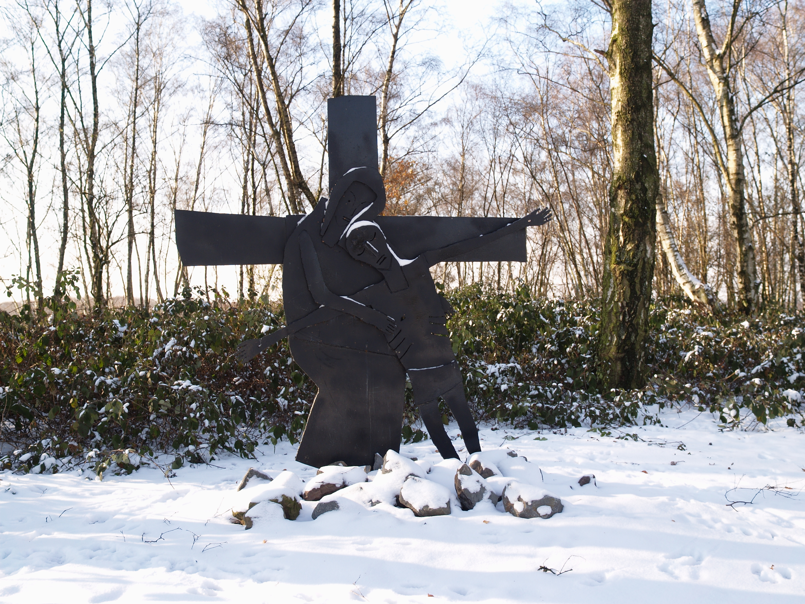 Halde Brockenscheid mit einer Kreuzwegstation von Paul Reding